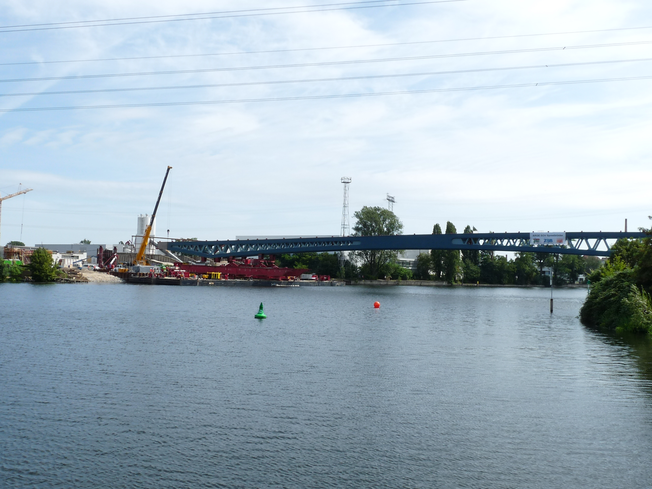 Die noch namenlose Brücke gehört zum Straßenprojekt Südostverbindung zwischen Rummelsburger Straße und Autobahn 113 am Teltowkanal. Damit sollen die stauträchtigen Ost-West-Verbindungen in Treptow entlastet werden. Die Brücke soll rund 50 Millionen Euro kosten und Ende 2016 fertig sein und 420 Meter lang sein.